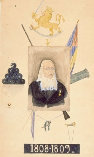 Porträtt av löjtnanten Carl Gustaf Jack (1782-1867) som deltog i Finska kriget som officer vid först Adlercreutska regemente, och sedermera vid Savolaks regemente. Vid Slaget vid Oravais erhöll han medaljen "För tapperhet i fällt" i guld, som kan ses på bilden. På bilden syns i mitten Carl Gustaf Jack, ovanför bilden syns Finalnds lejon. Man kan även se en kanon, en musköt, ett kruthorn, samt den svenska flaggan med unionstecken i hörnet. Målning på Bohusläns museum, av okänd konstnär.